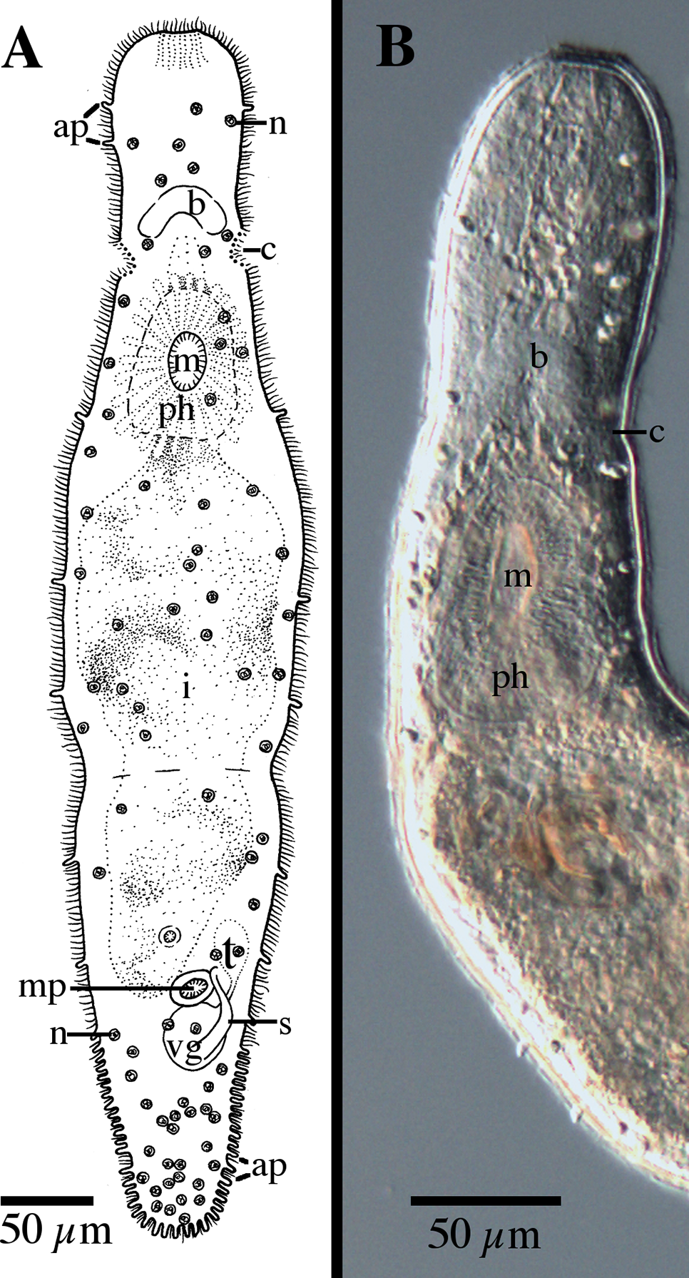 A. Dibujo de todo el cuerpo. B. Micropictografía del cuerpo. ap papilas adhesivas; b cerebro c fosas ciliares; i intestino; m boca; mp poro masculino; n nematocisto; ph faringe; r rhabdites; s estilete masculino; t testículos; vg vesicula granulorum.